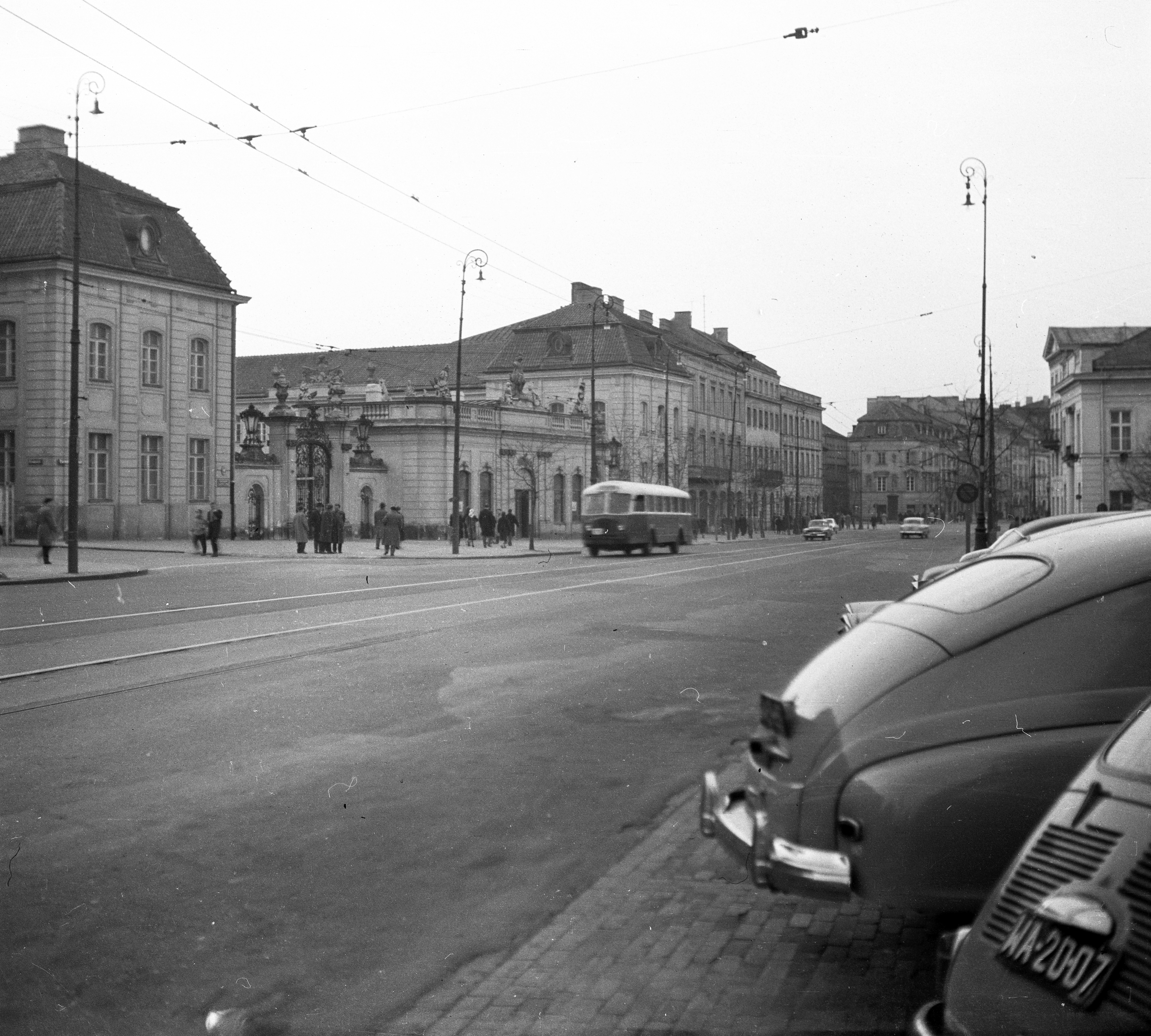 ulica Krakowskie Przedmieście, balra a Potocki-palota. Location: Poland, Warsaw Tags: street view, bus, automobile, number plate, lamp post, genre painting Title: ulica Krakowskie Przedmieście, balra a Potocki-palota.